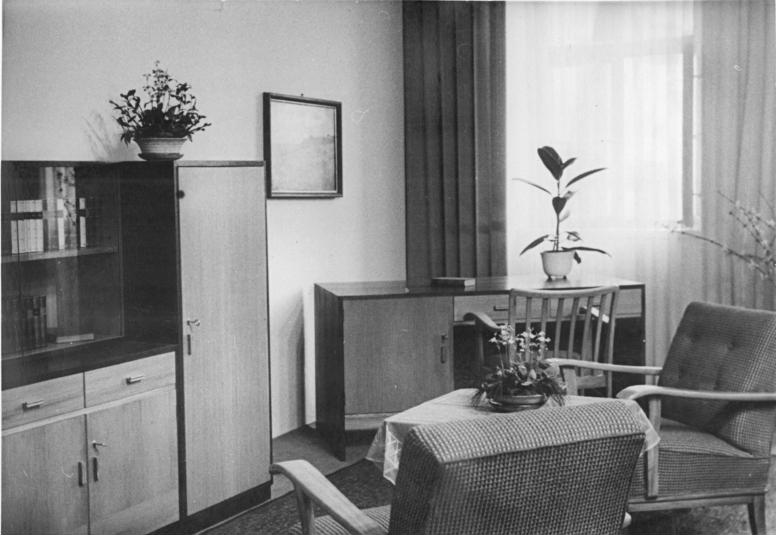 Leipzig, Messe, Musterwohnzimmer Leipziger Frühjahrsmesse 1950. Vom 5.-12. März 1950 findet in Leipzig die diesjährige Frühjahrsmesse statt. Rund 7500 Aussteller sind vertreten. Die Sowjetunion tritt mit einer umfassenden Kollektivschau in Erscheinung. UBz: Diese ansprechende Wohn- und Arbeitszimmer ist auf der Schau der VVB-Sachsenholz zu sehen.Aufn.: Illus Blanck (4) 9.3.59 5727-50-Schw.